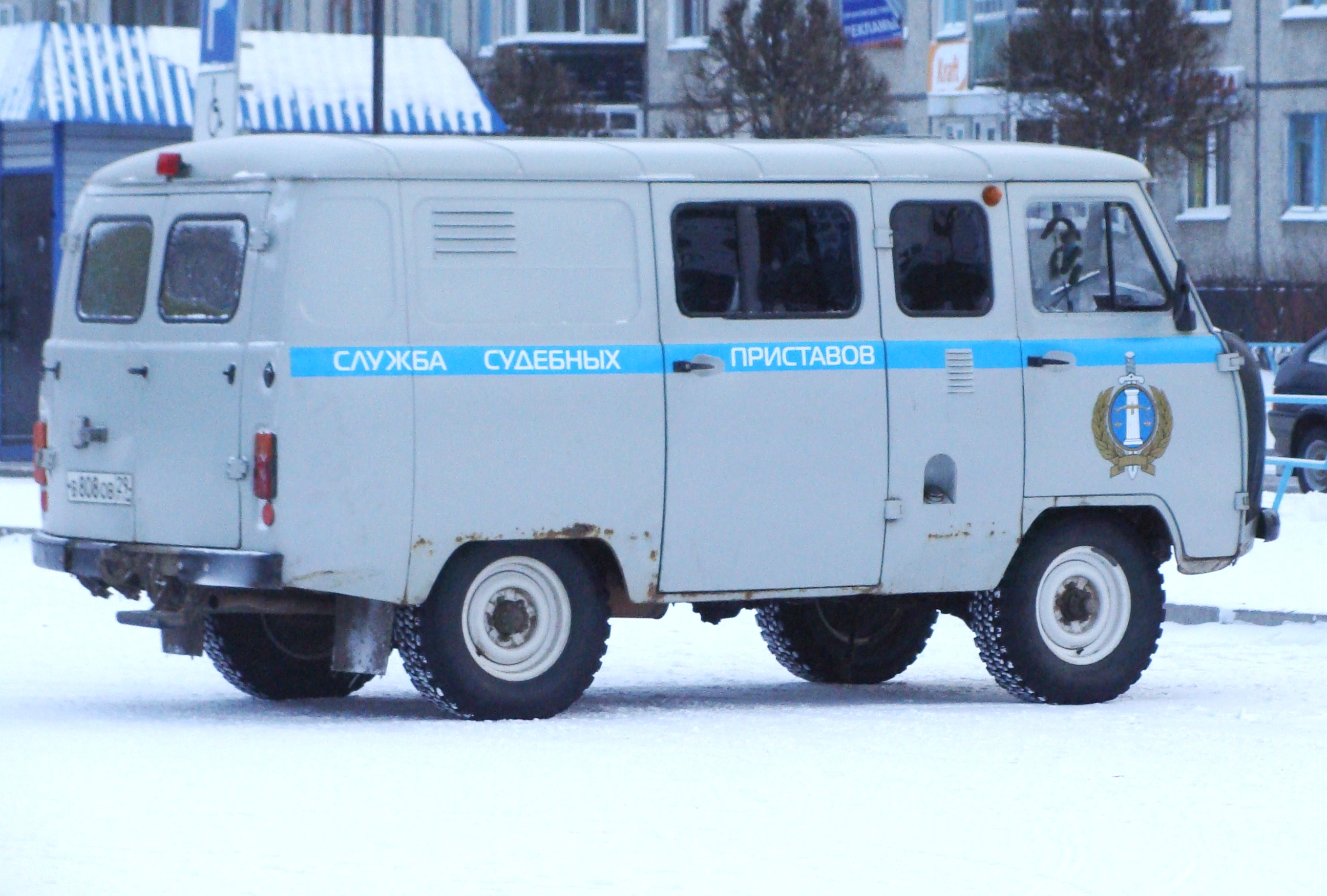 Автомобиль службы судебных приставов, Коряжма.